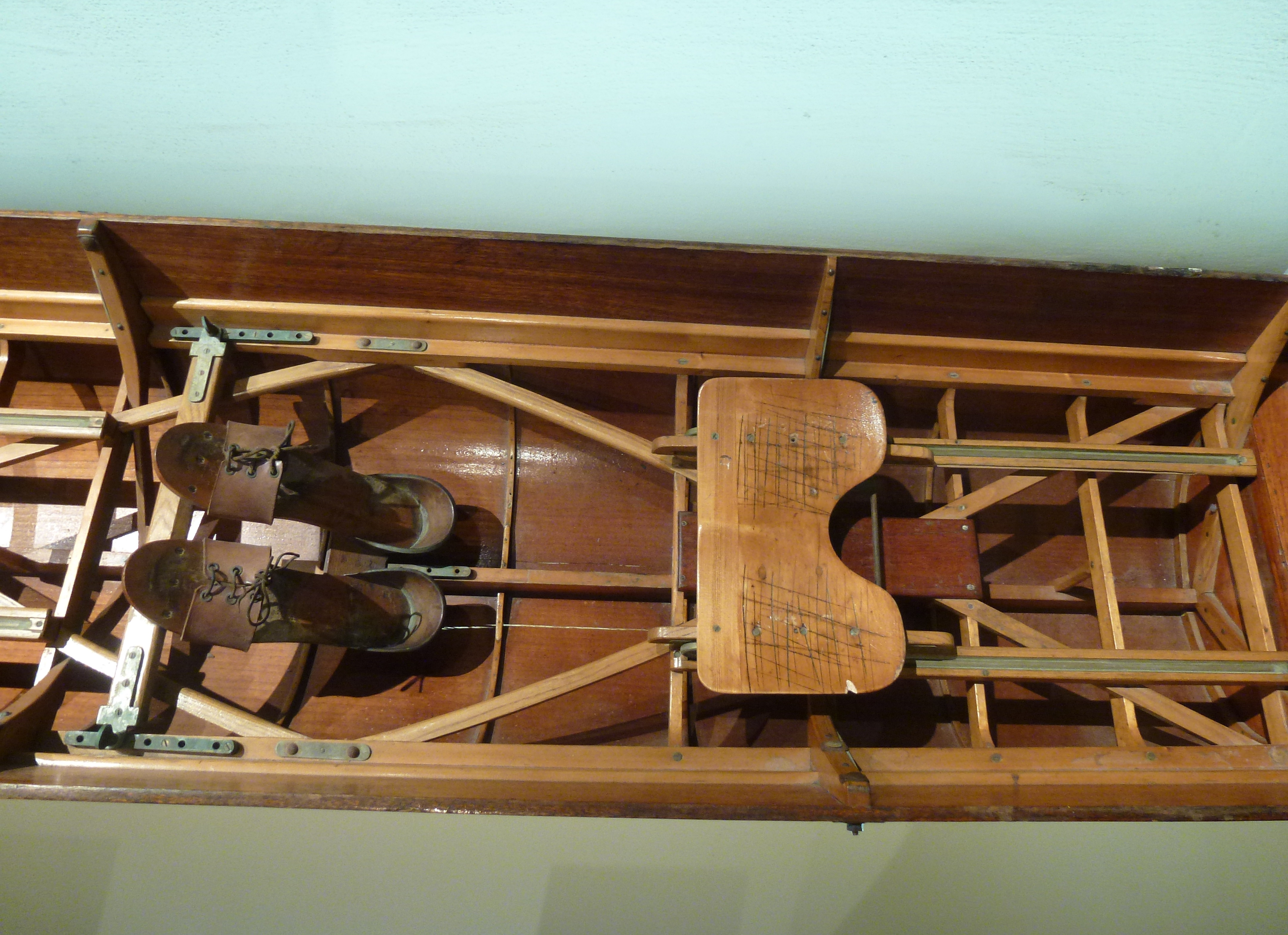 Sommarolympiaden i Stockholm 1912, vinnarbåten i klass utriggade åttor, Leander Rowing Club